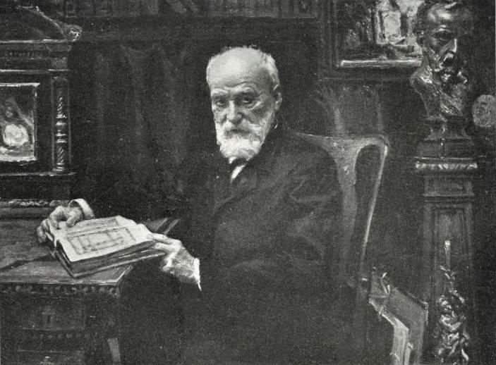 "Portrait de M. Vaudremer, de l'Institut".